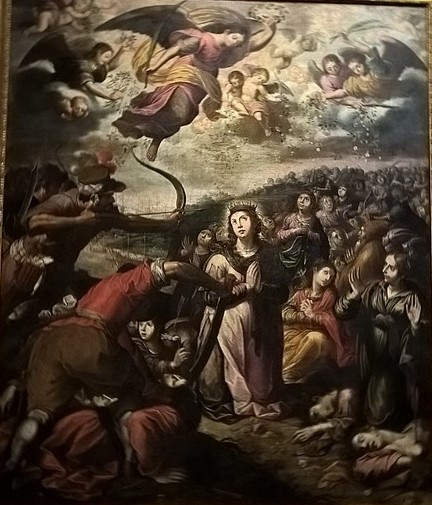 Martírio de Santa Úrsula e das Onze Mil Virgens, óleo sobre tela de Martim Conrado, de 1653, no Museu de Arte Sacra do Funchal, proveniente da Igreja de S. João Evangelista